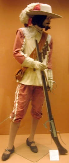 Arcabucero español del XVII Malaga, Spain - arquebuser model (Gibralfaro exhibition)